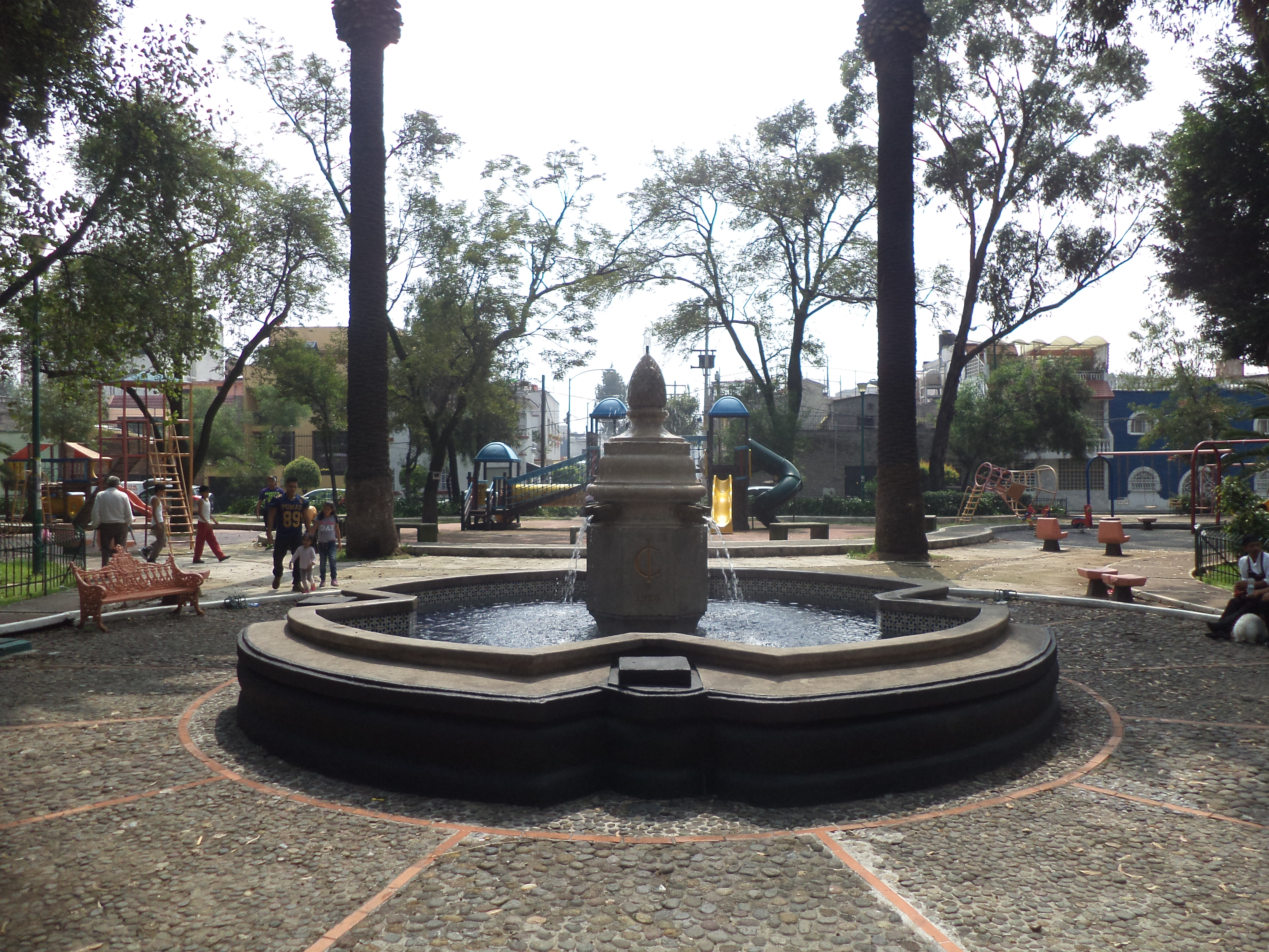 Fuente del parque Maria del Carmen